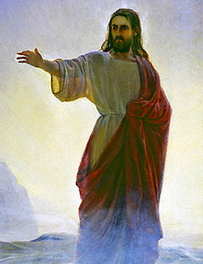 Fragmento de la obra "Denying Satan" ('Negando a Satán') de Carl Bloch, ilustrando una escena en la que Jesucristo resiste la tentación del diablo.